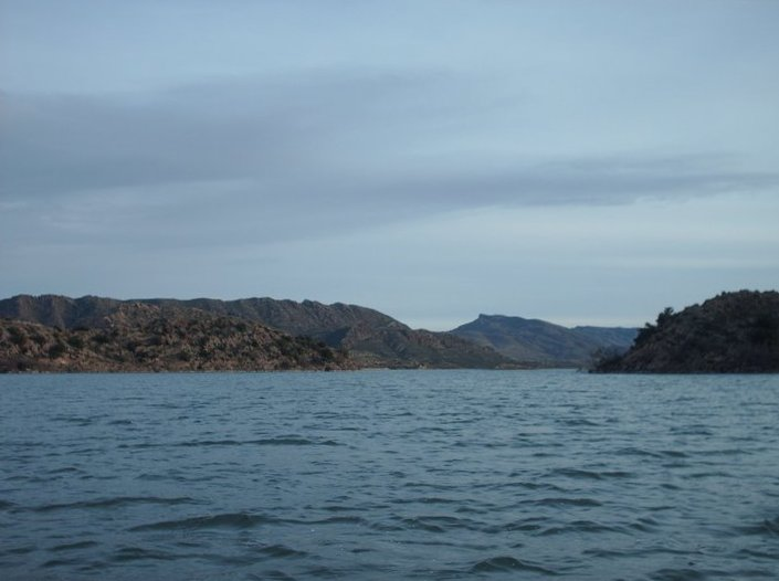 بحيرة سيدي سعد